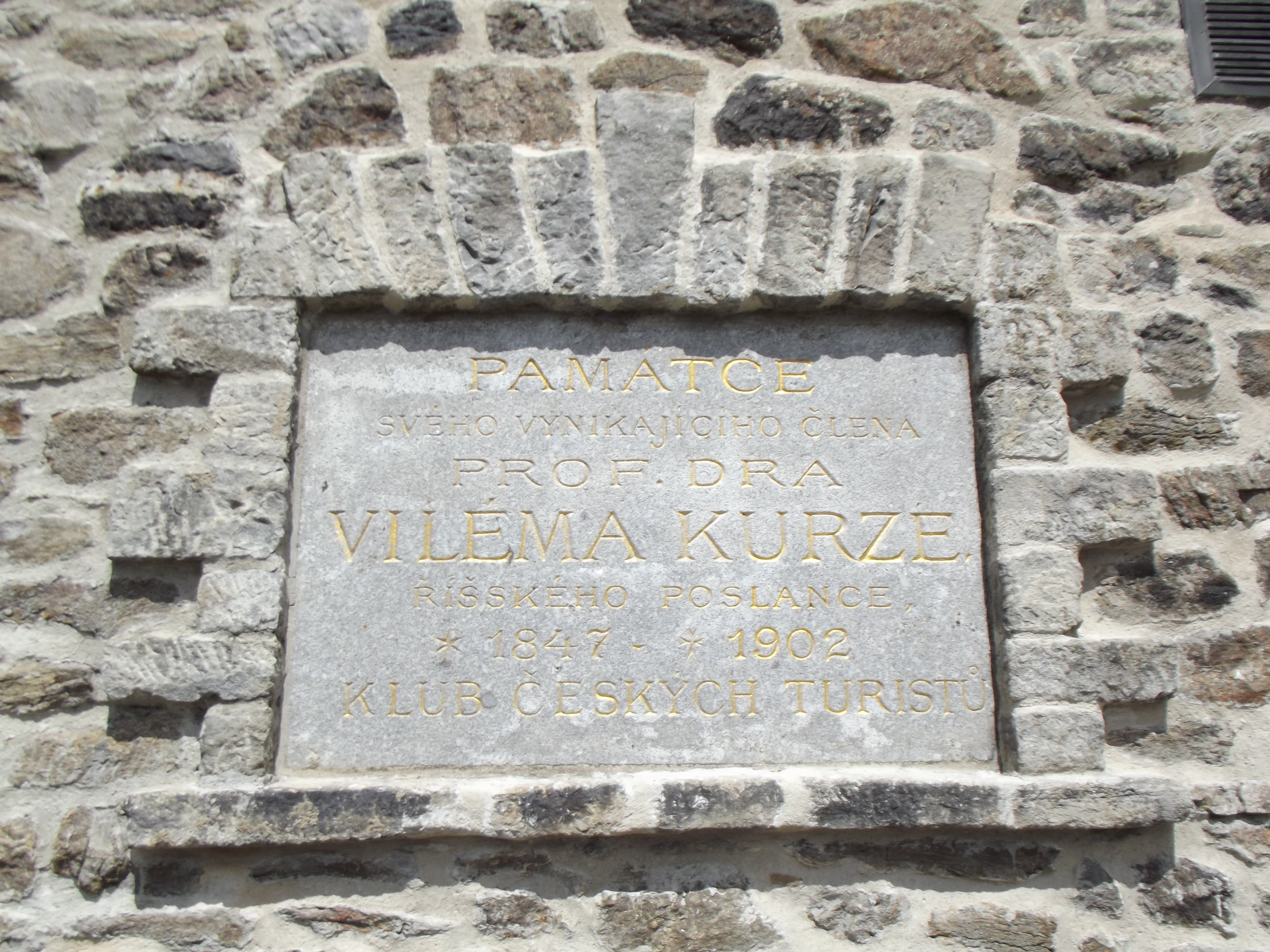 Památník člena pohraniční stráže na Kurzově rozhledně.